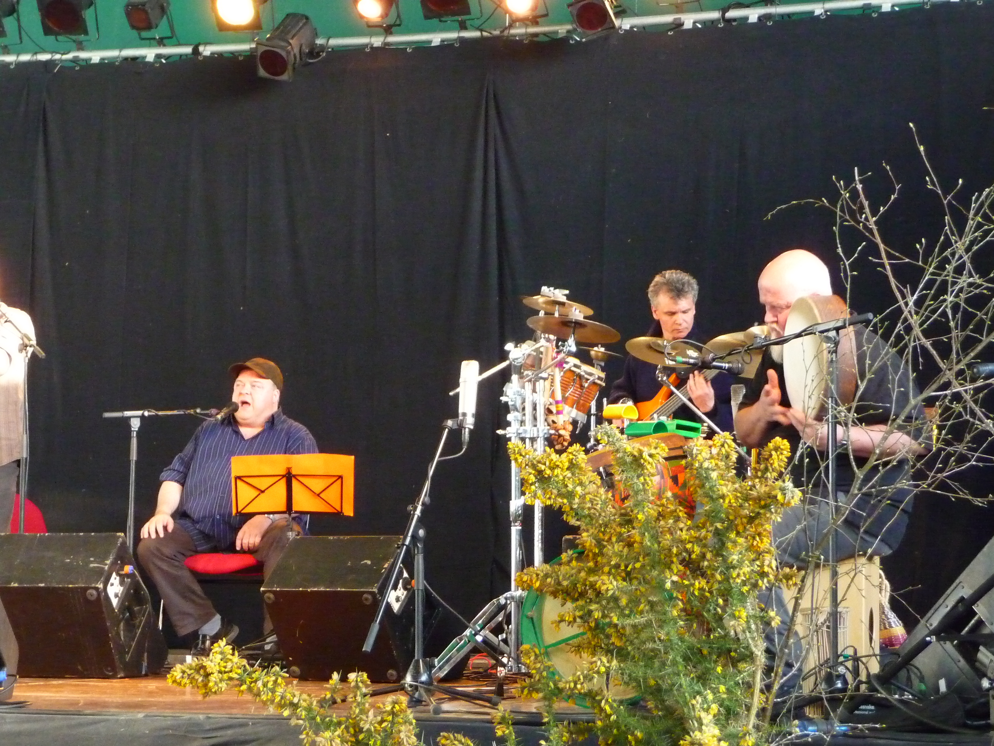 Toud'Sames au Printemps de Chateauneuf en avril 2009